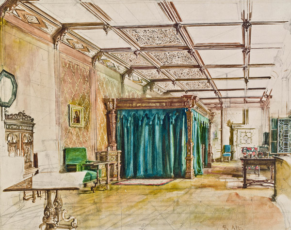 Interieur aus Schloss Hradek.